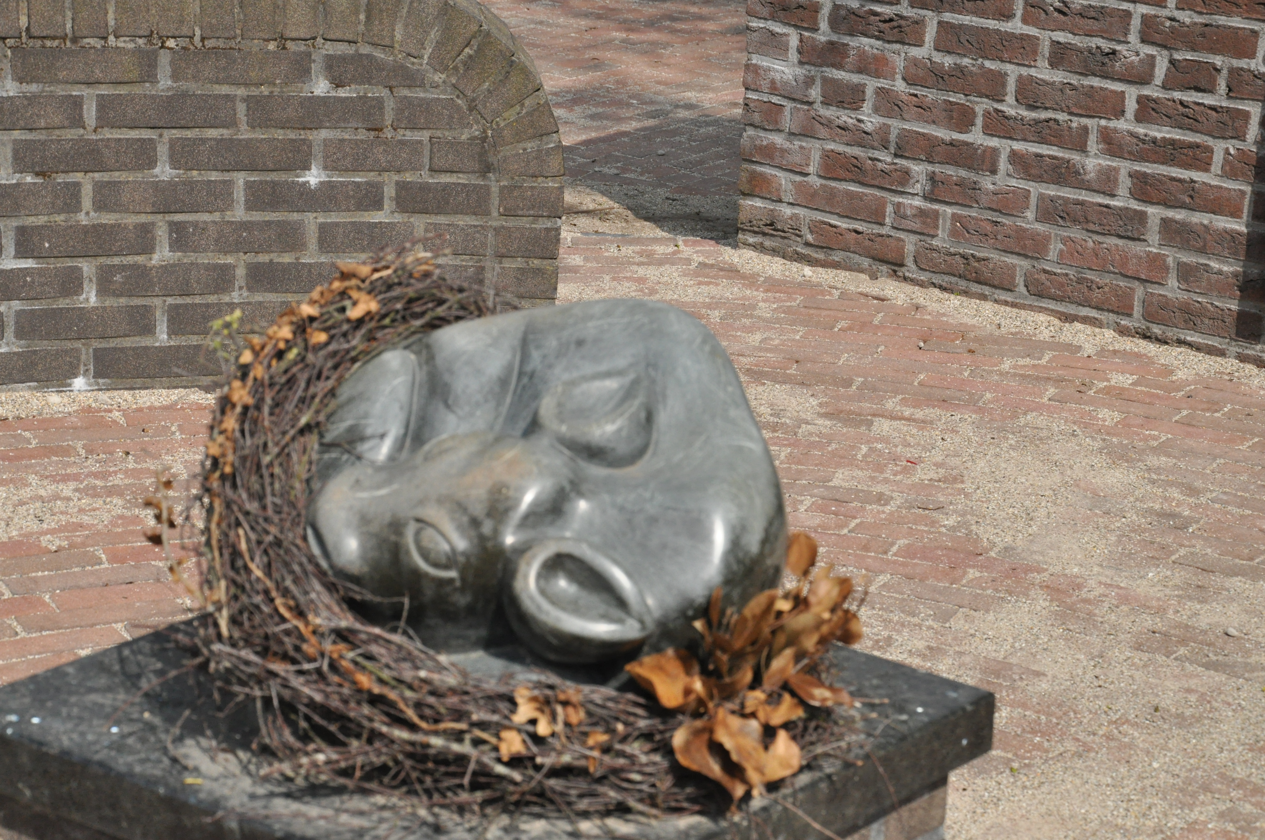 Monument tgv MKZ crisis 2001 Oene